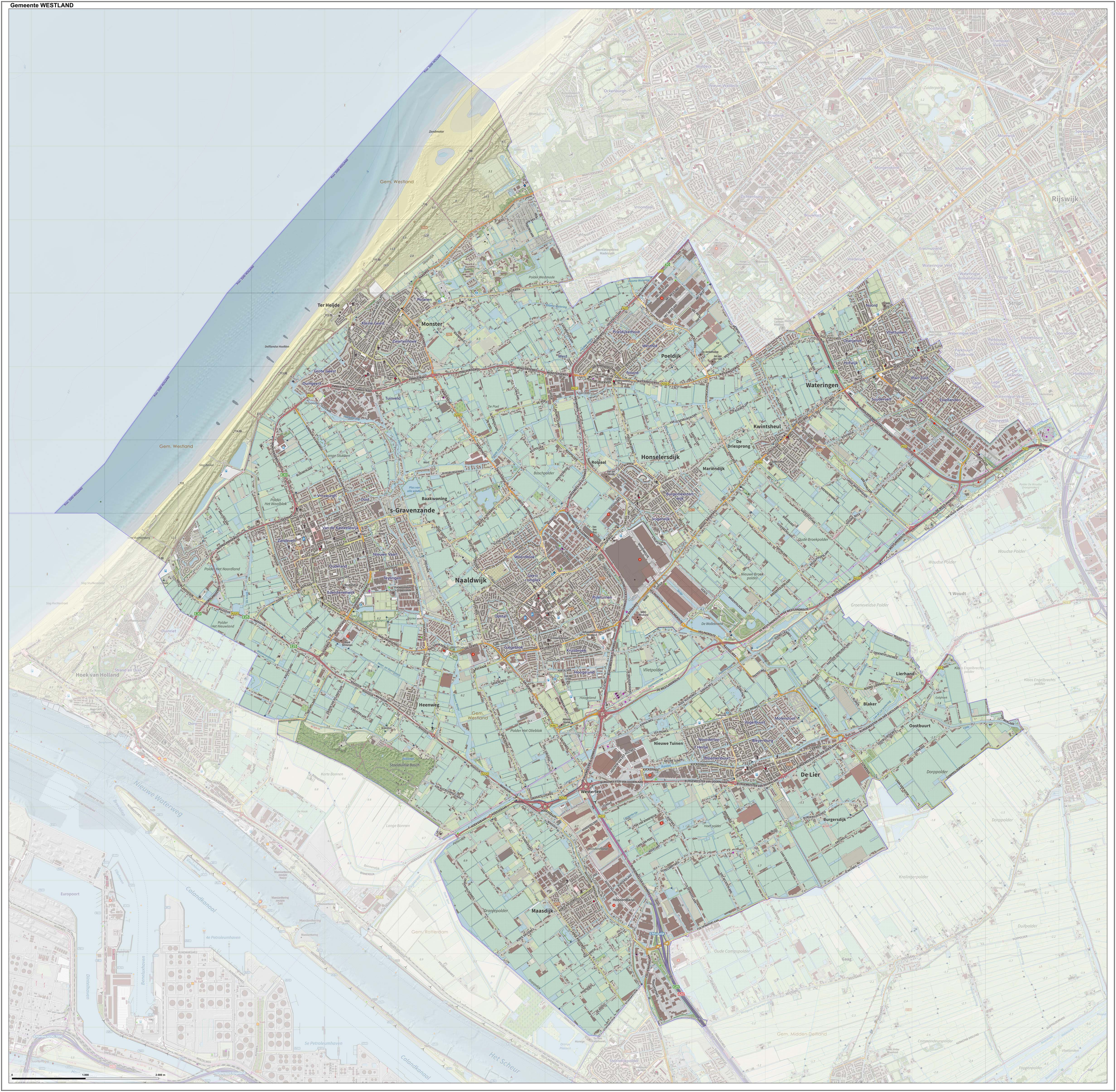 Topografische gemeentekaart. Resolutie: 400 pixels/km. Kaartbeeld samengesteld uit de open geodata van de Top10NL en Top25namen (Kadaster), Creative Commons-BY licentie. Gebouwvlakken uit open geodata BAG extract. Wegen uit de OpenStreetMap, OpenStreetMap community. Reliëfschaduw uit de Actuele Hoogtekaart AHN2. Samenstelling en kleurenschema: Jan-Willem van Aalst, met QGIS. Zie ook de Legenda.